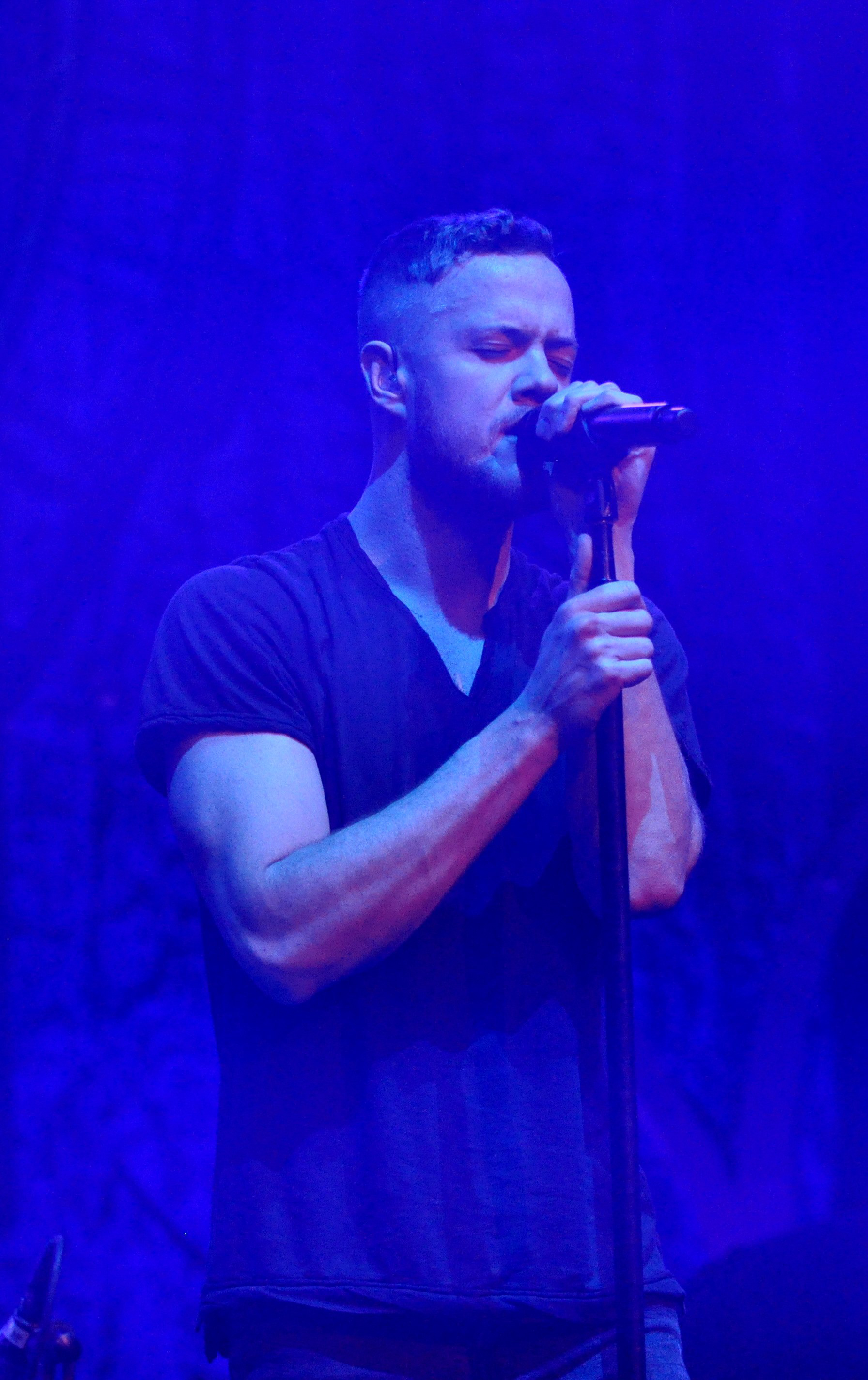 Dan Reynolds en 2014